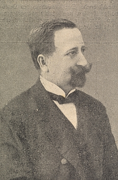 Ferdinand Maurer (1866 - 1927), Rakousko-uherský a státní úředník a spisovatel.